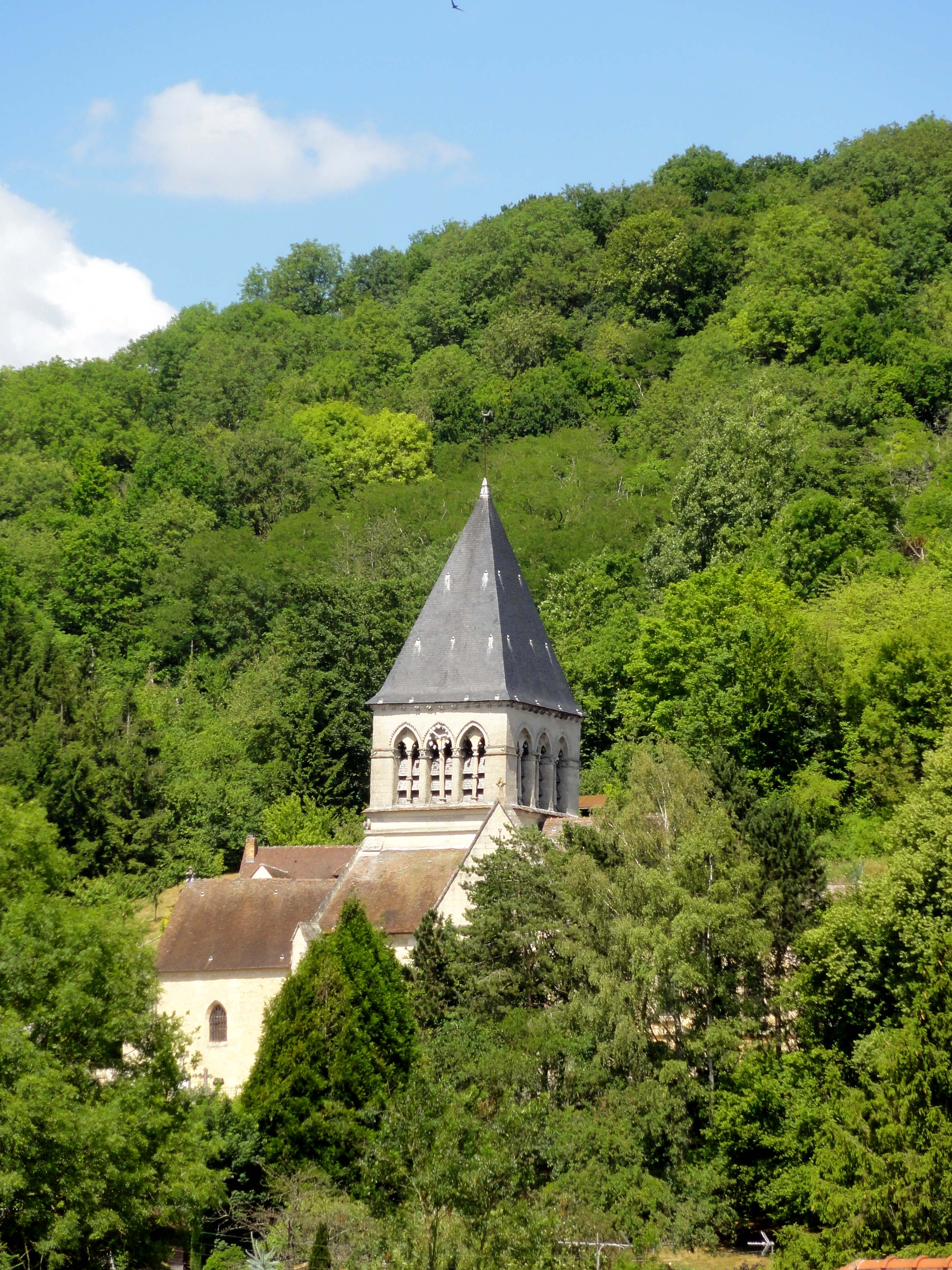 Église Saint-Étienne de Clairoix (voir titre).